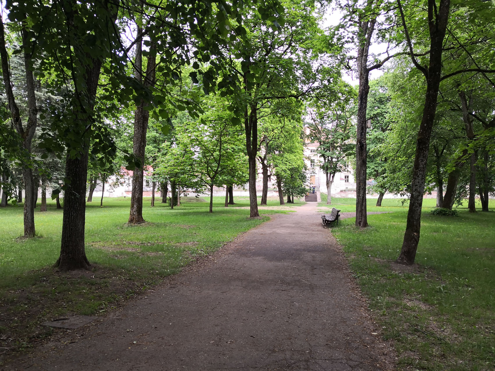 Sapiegų rūmų parko centras, žvelgiant iš vakarų į rytus, į Sapiegų rūmų pusę. 2018 m. gegužė, G. Kulikausko fotografija.